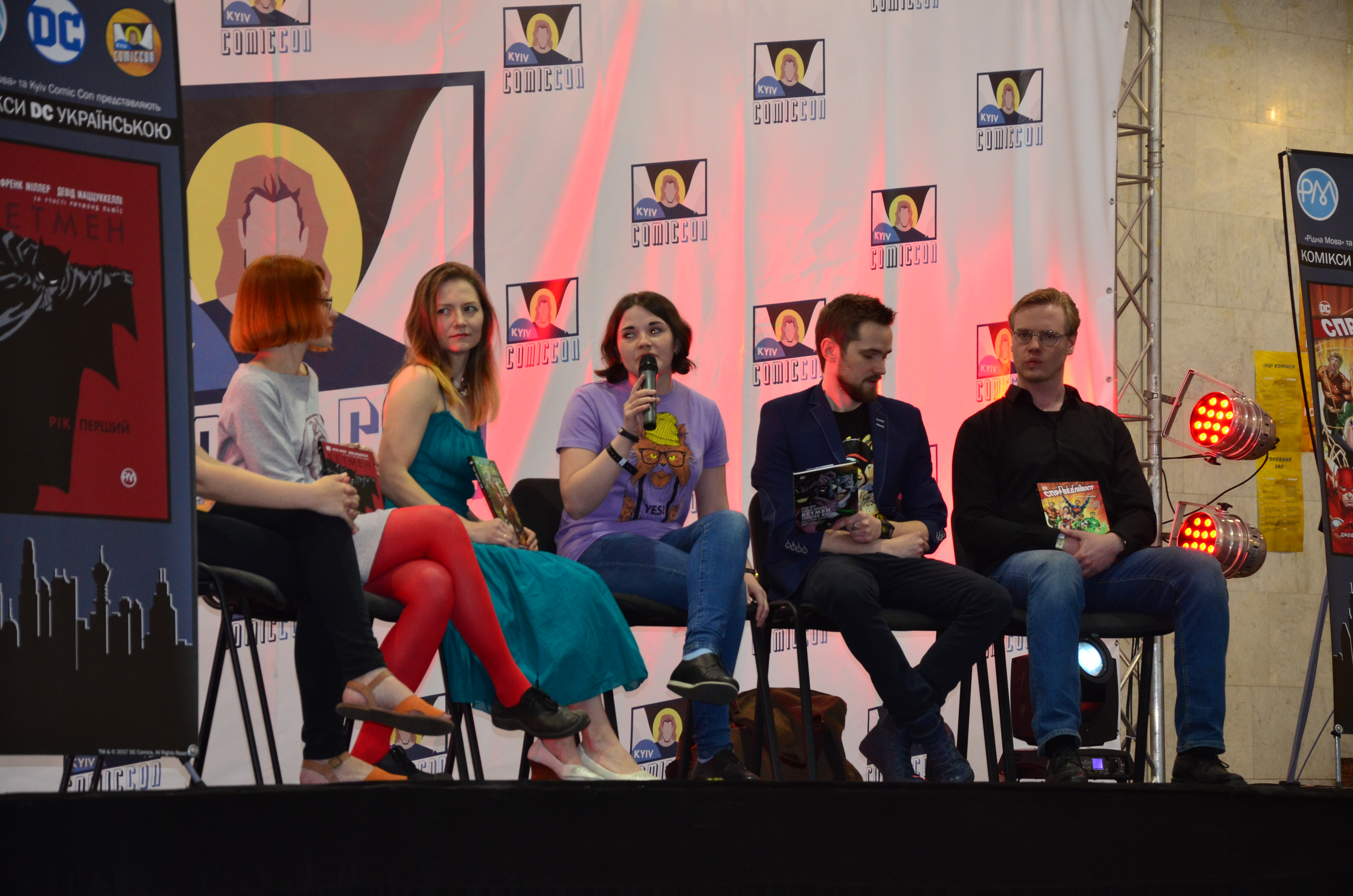 Фестиваль Kyiv Comic Con 2017 в Украинском Доме.